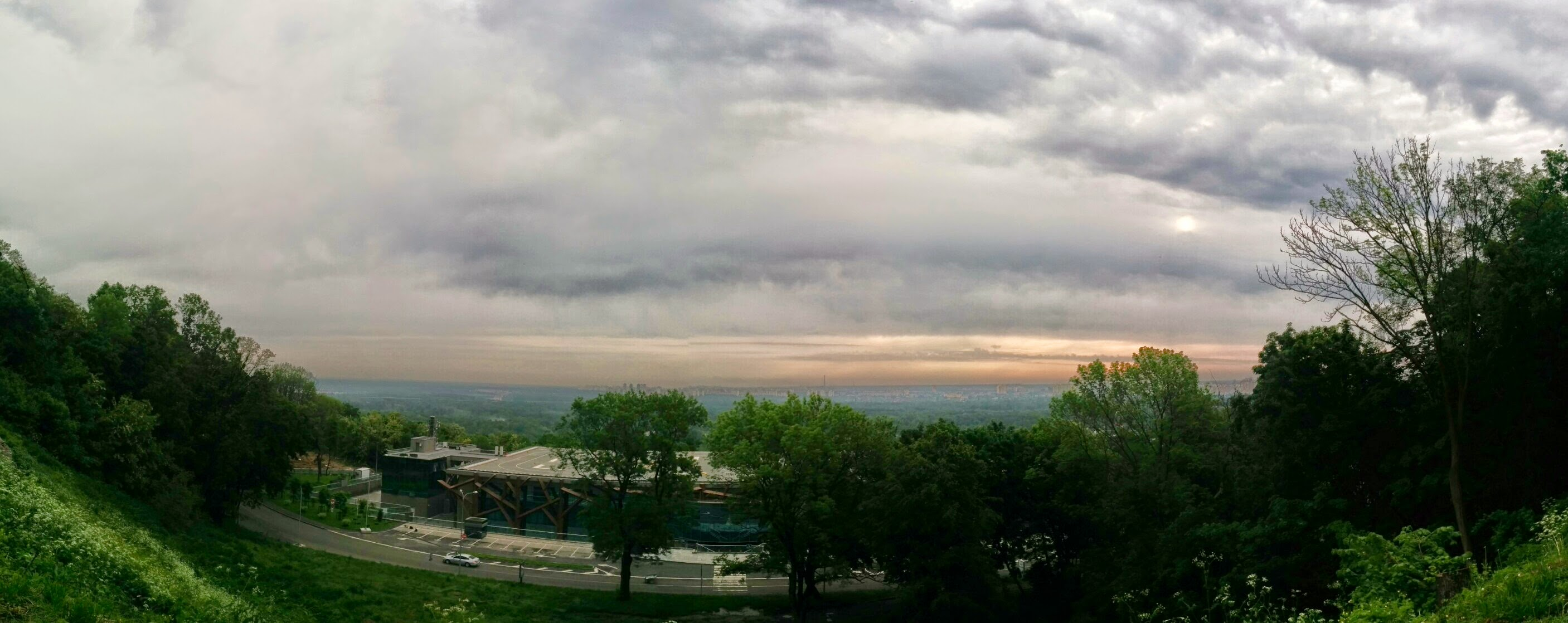 Маріїнський, Печерський район